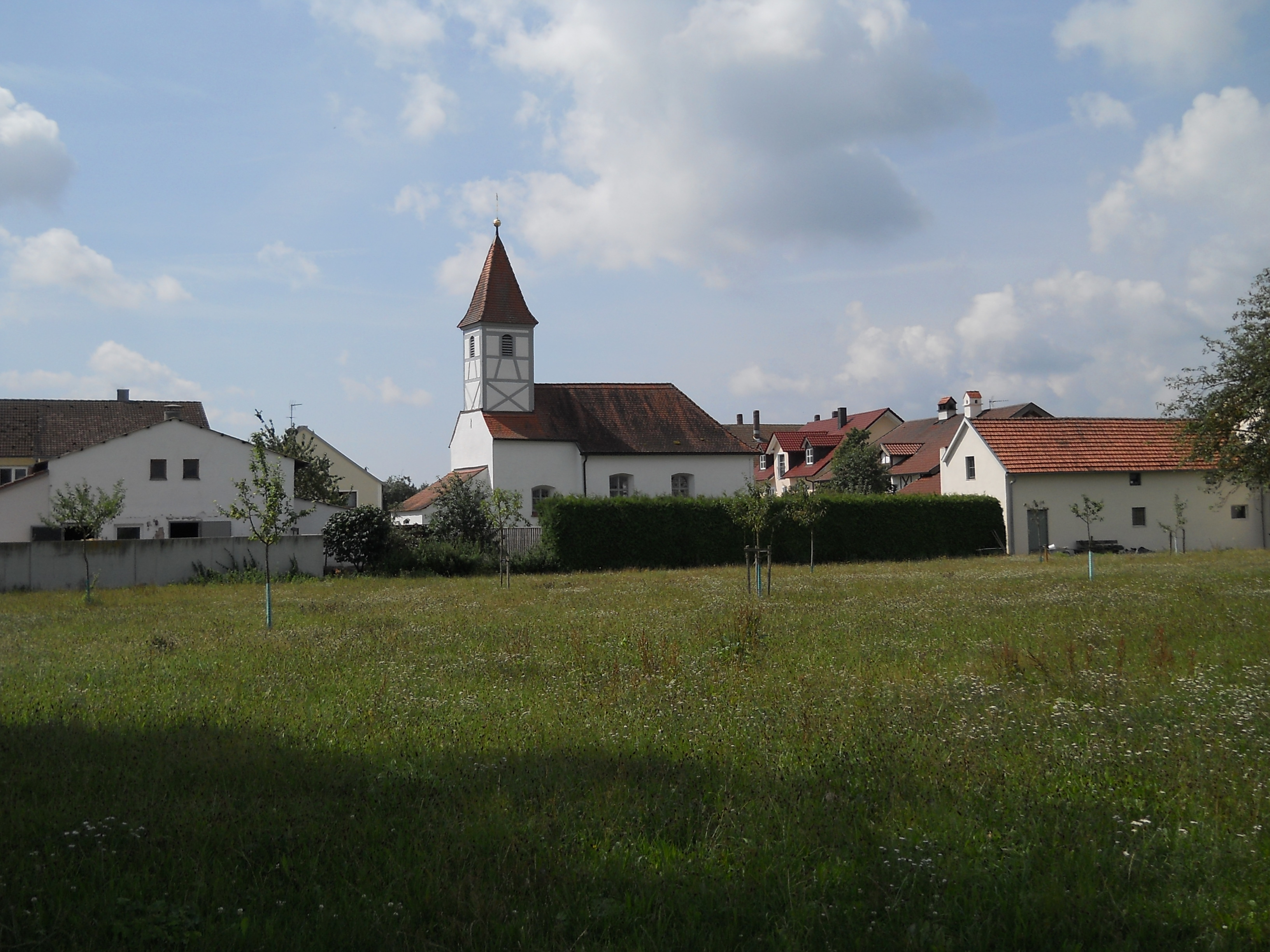 Heiligenkreuz, Gemeindeteil von Titting im oberbayerischen Landkreis Eichstätt